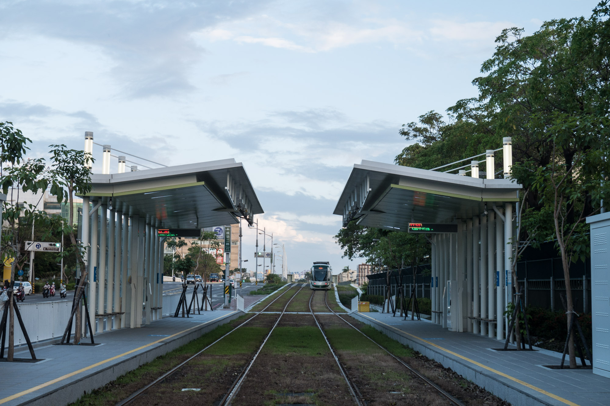 經貿園區站